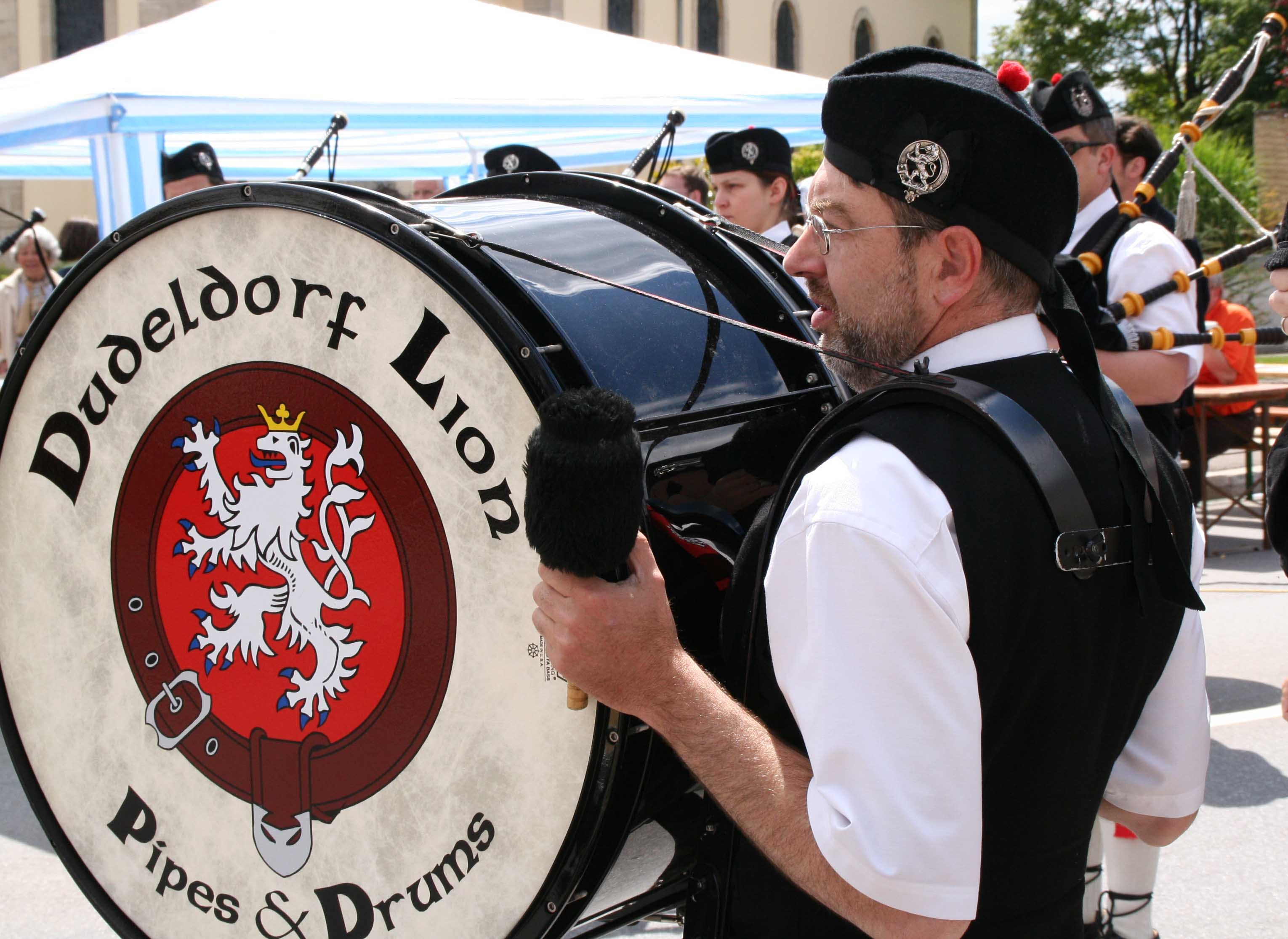 Dudeldorf Lion Pipes & Drums.